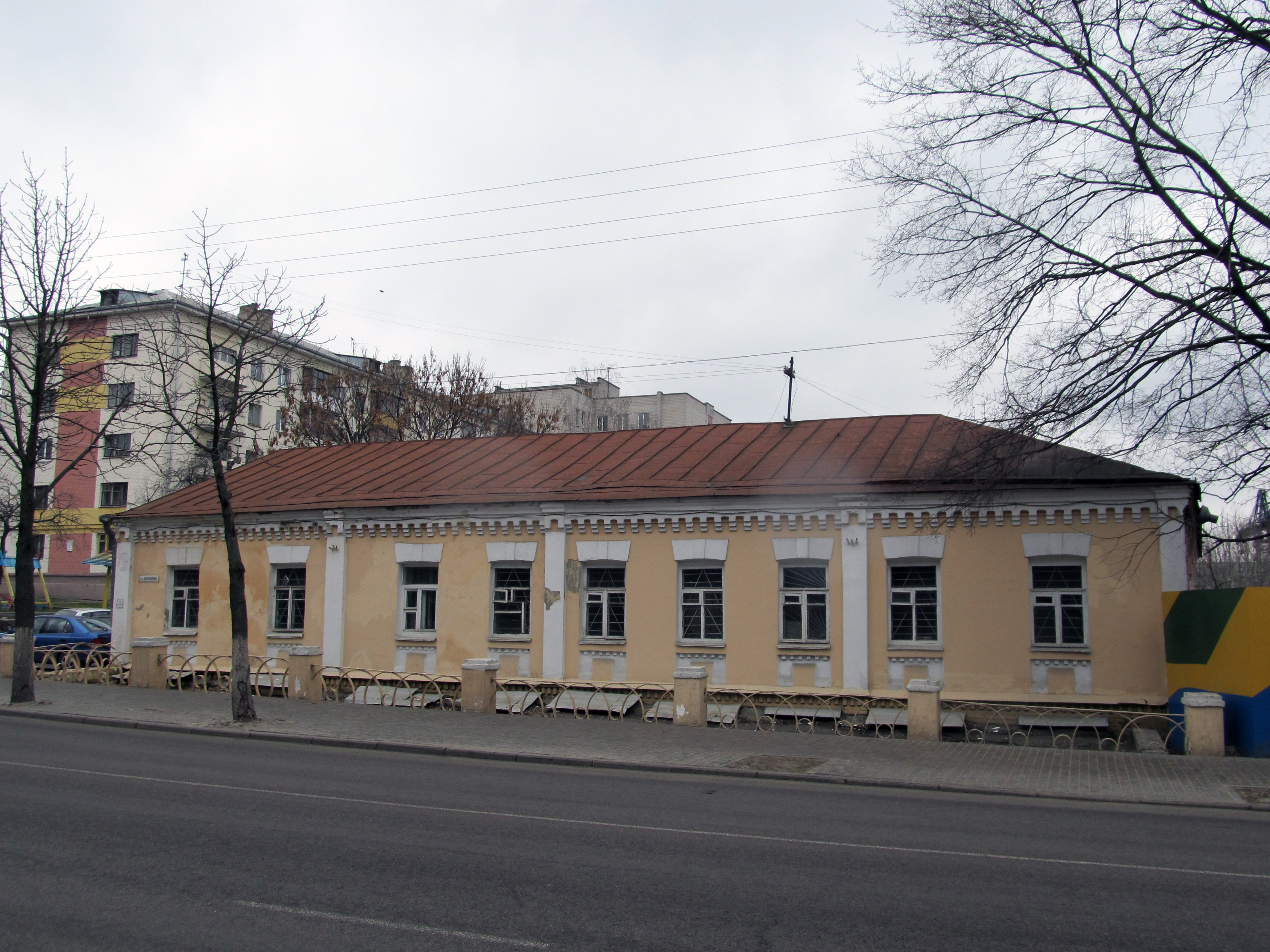 Беларуская (тарашкевіца): Забудова вул. Пралетарскай. г. Гомель This is a photo of Belarusian heritage monument. Reference number: 313Г000056 ( WLM)